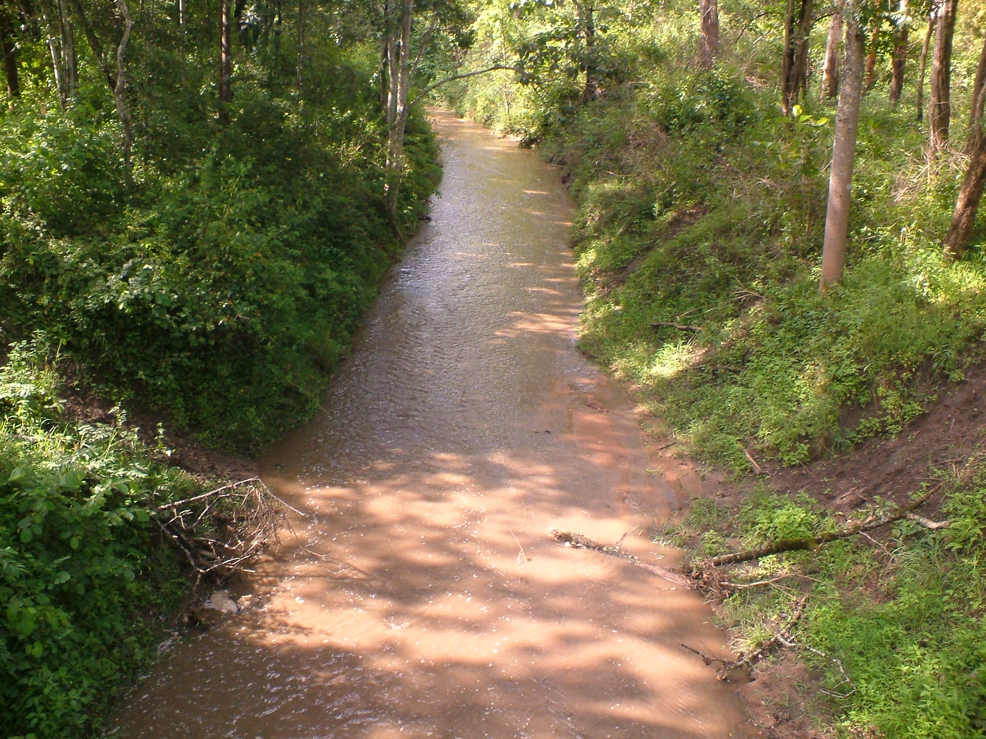 ബന്ദിപൂർ വനങ്ങളിലെ ഒരു കാട്ടരുവി